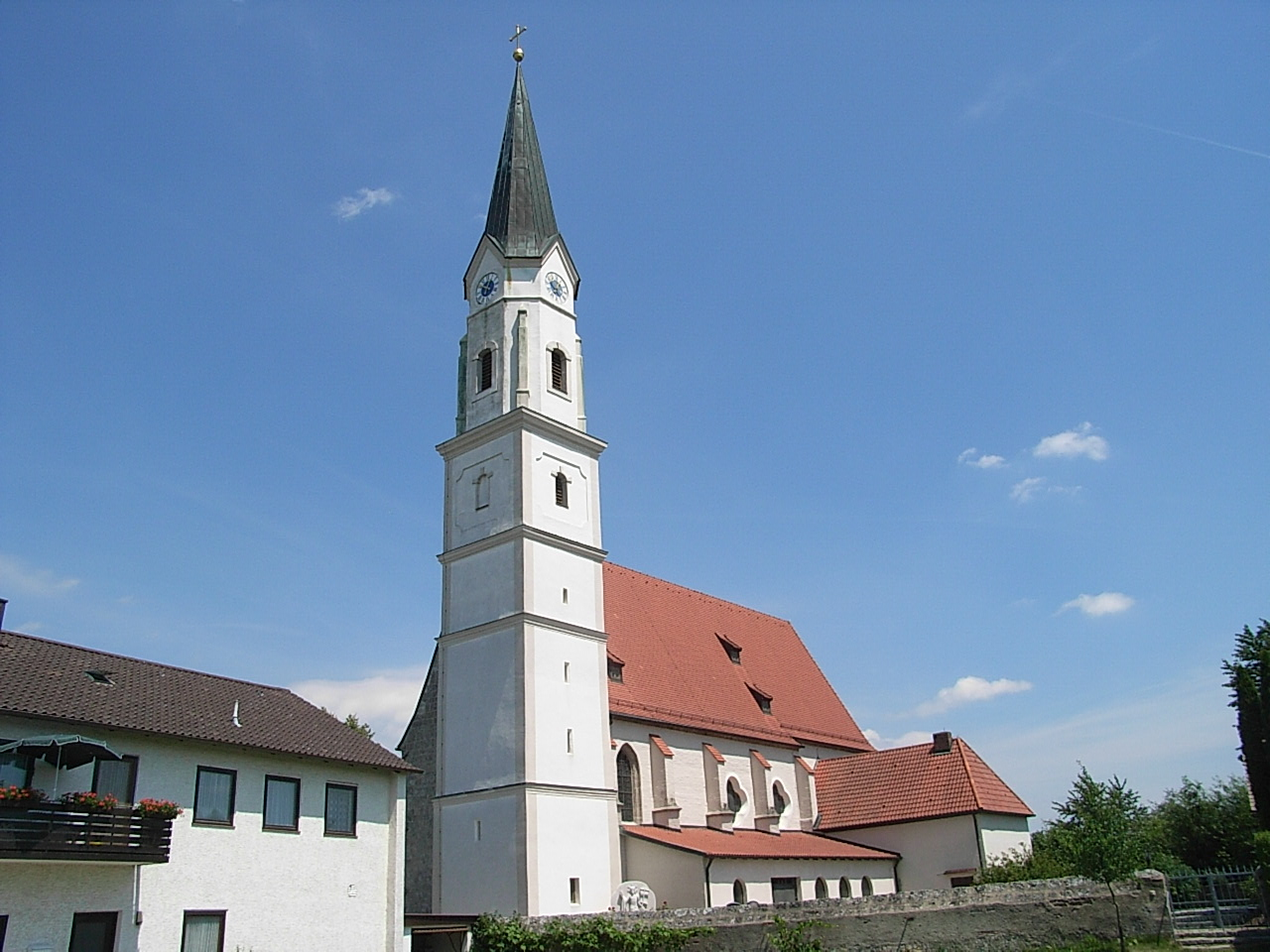 Die Pfarrkirche Maria Himmelfahrt in Kirchdorf am Inn